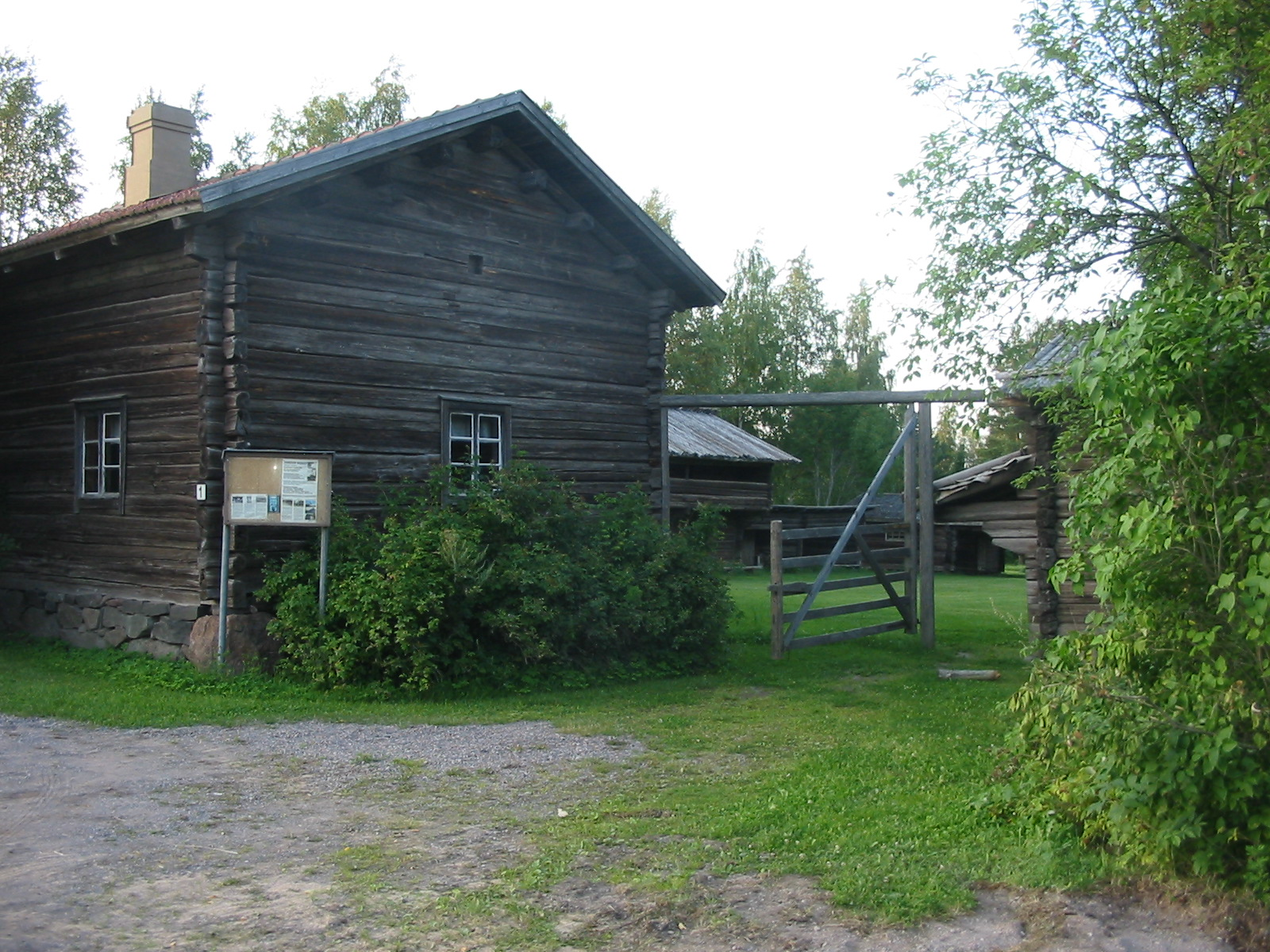 Someron torppamuseo